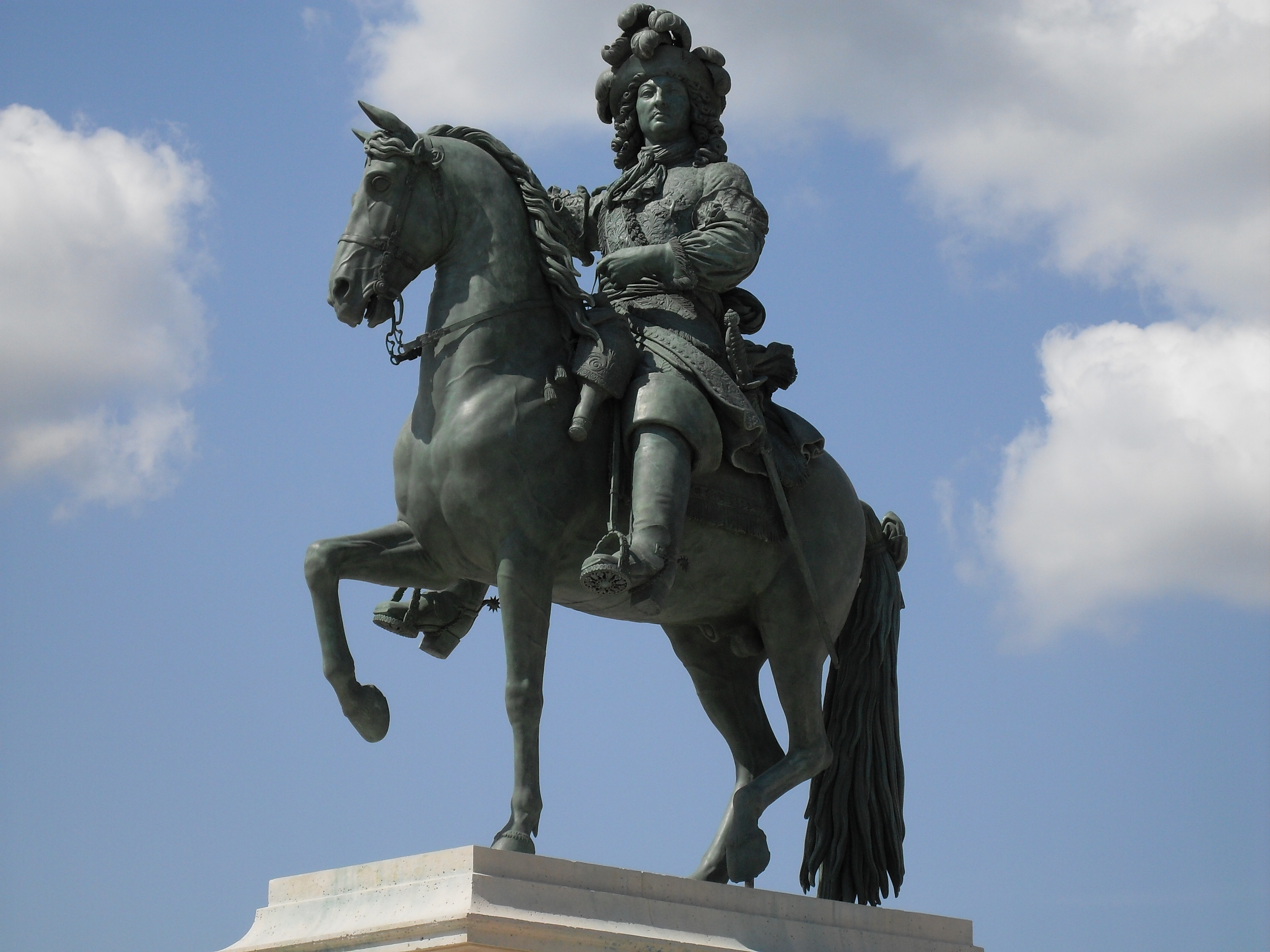 France, Versailles, Yvelines (78) - Statue équestre de Louis XIV dans la Cour d'honneur du Château de Versailles, déplacée vers la Place d'Armes en 2009.